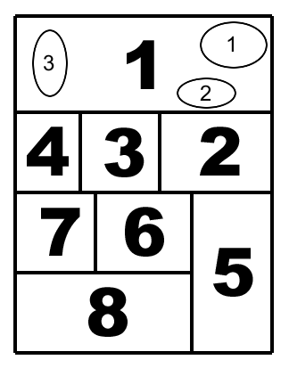 Schematische Leserichtung eines Manga, mit Sprechblasen